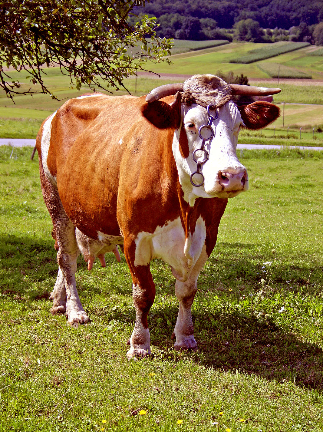 Domače govedo